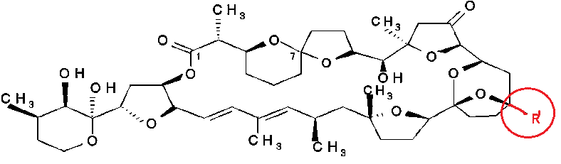 Los diferentes derivados de las PTX se diferencias en el grupo R' que se observa en la imagen